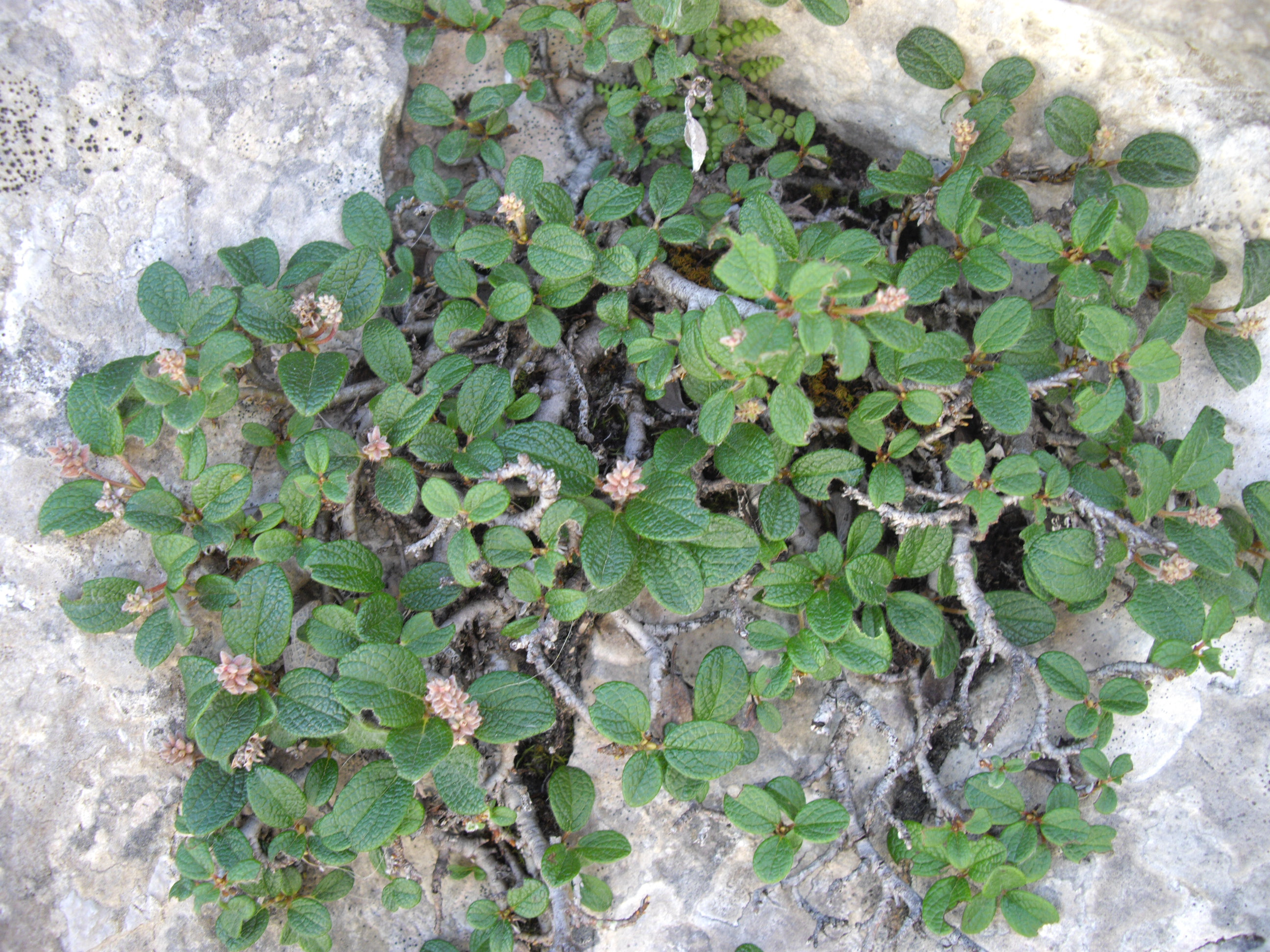 Salix reticulata